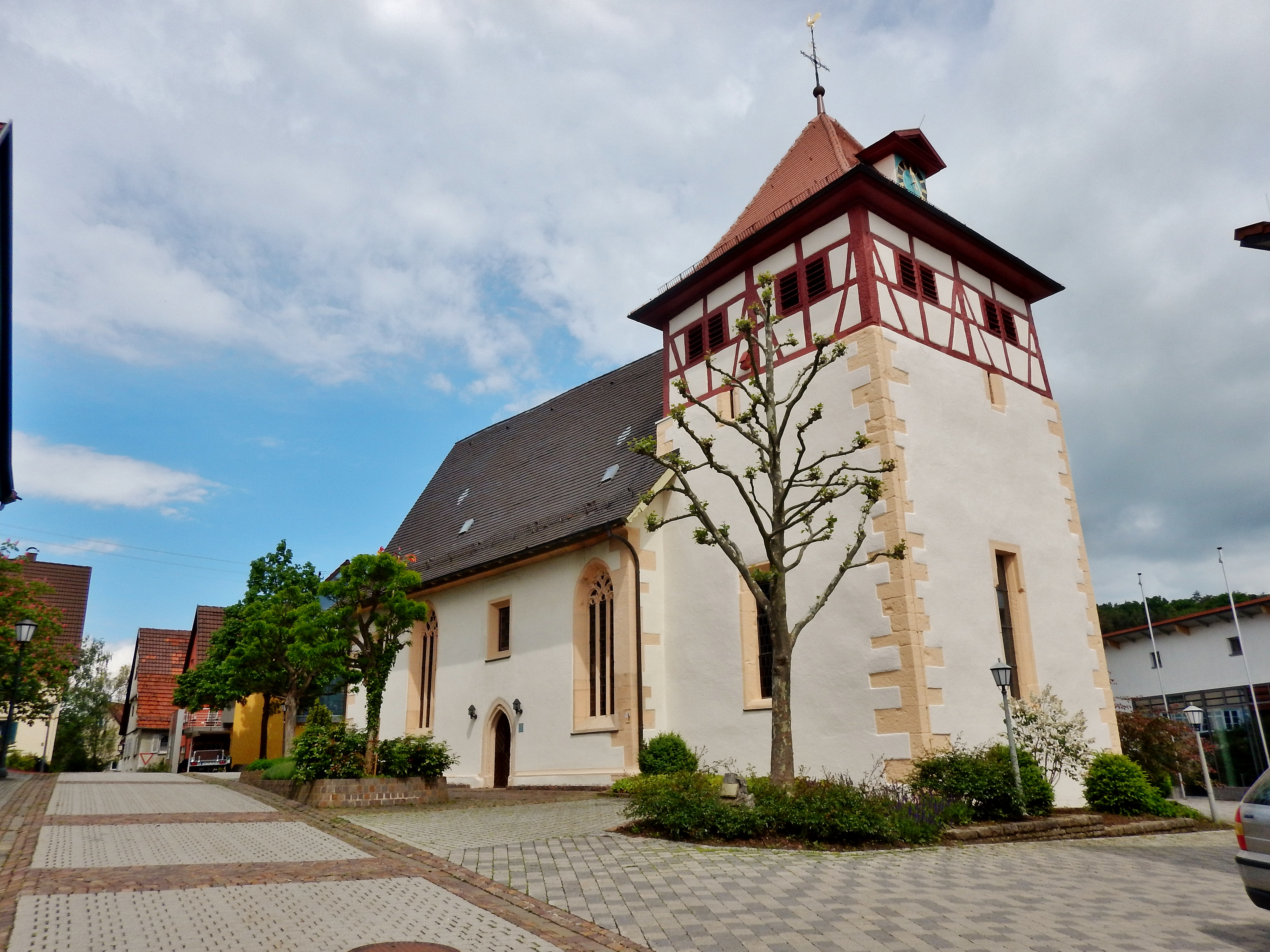 Ostelsheimer Kirche von 1488: Die Platane wurde 1988 anläßlich des 500-jährigen Bestehens gepflanzt.